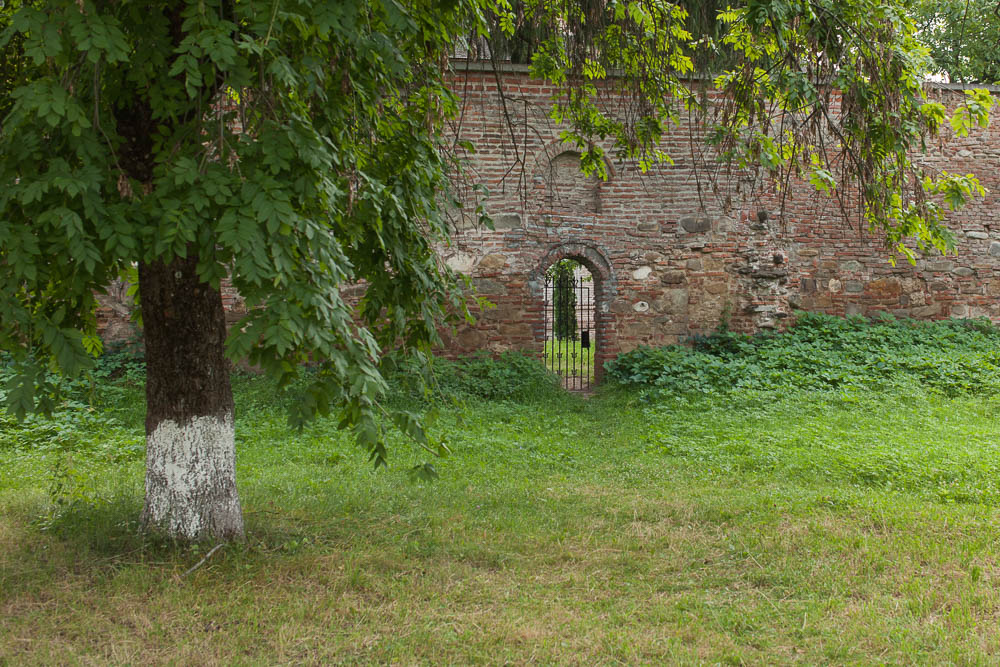 Zid de incintă 05